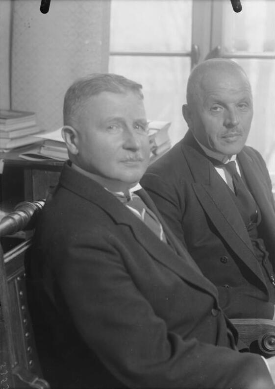 Die Einführung des neuen deutschen Reichswehrministers Groener in sein Amt! Der neue Reichswehrminster Groener (links) und der ehemalige Reichswehrminister Dr. Gessler (rechts) in Abschieds-Audienz im Reichswehrministerium in Berlin, Bendlerstrasse. Information added by Wikimedia users.Berlin, Wilhelm Groener, Otto Karl Geßler